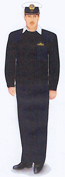 Rysunek ten pochodzi z załącznika do rozporządzenia ministra obrony narodowej z dnia 2 grudnia 2004 r. w sprawie wzorów oraz noszenia umundurowania i oznak wojskowych przez żołnierzy zawodowych i kandydatów na żołnierzy zawodowych.